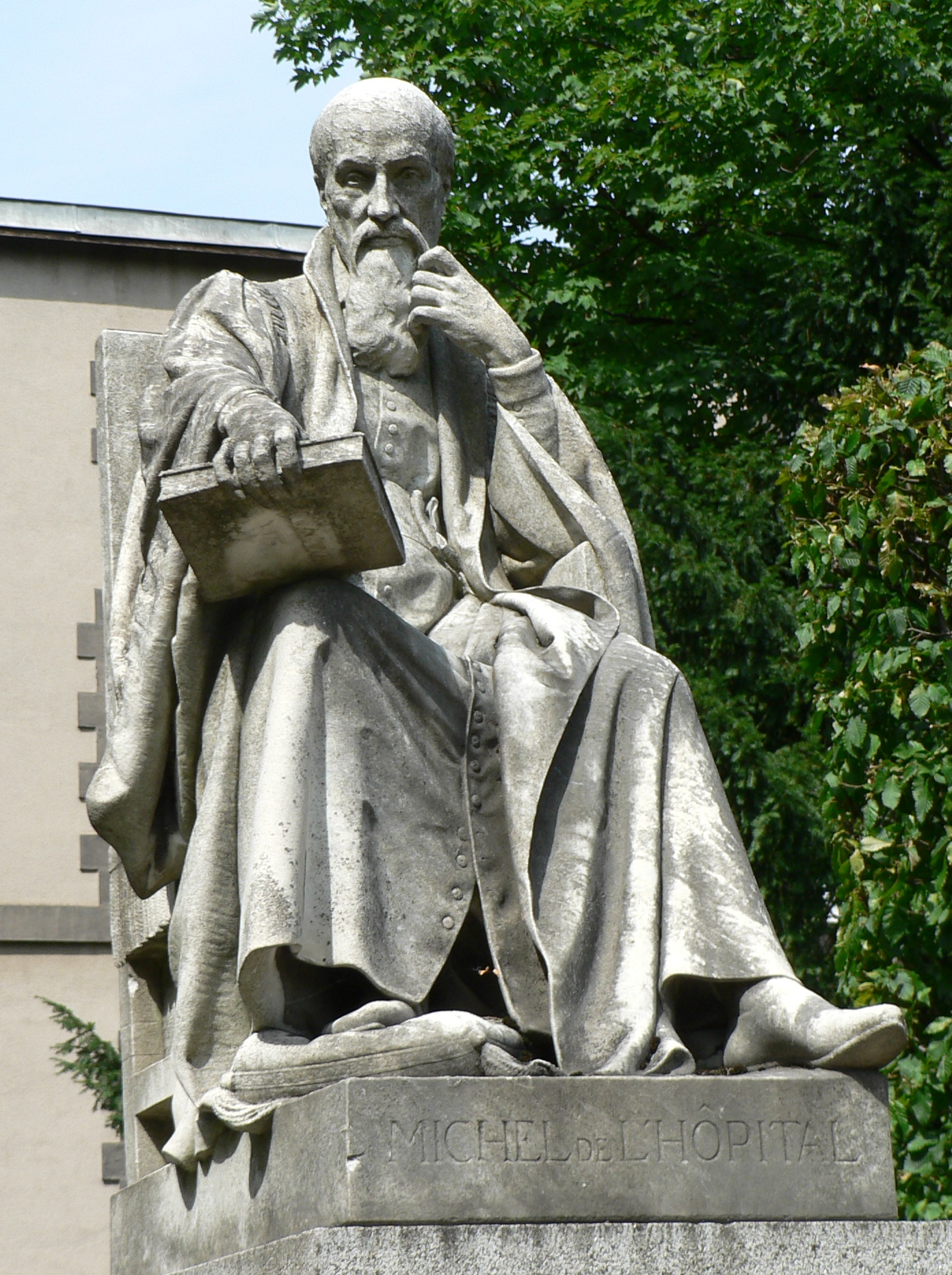 Eugène Sollier: Michel de l'Hospital, statue, 1881, Parc de la Sainte-Chapelle à Riom. L'oeuvre est datée et signée.